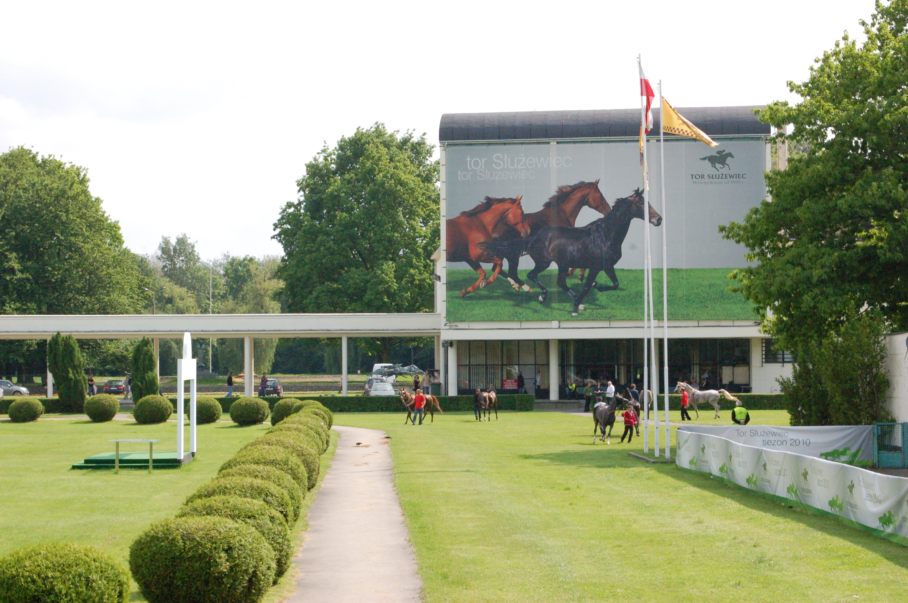 Pferderennbahn Ursynow, Warschau, Pferdepräsentation